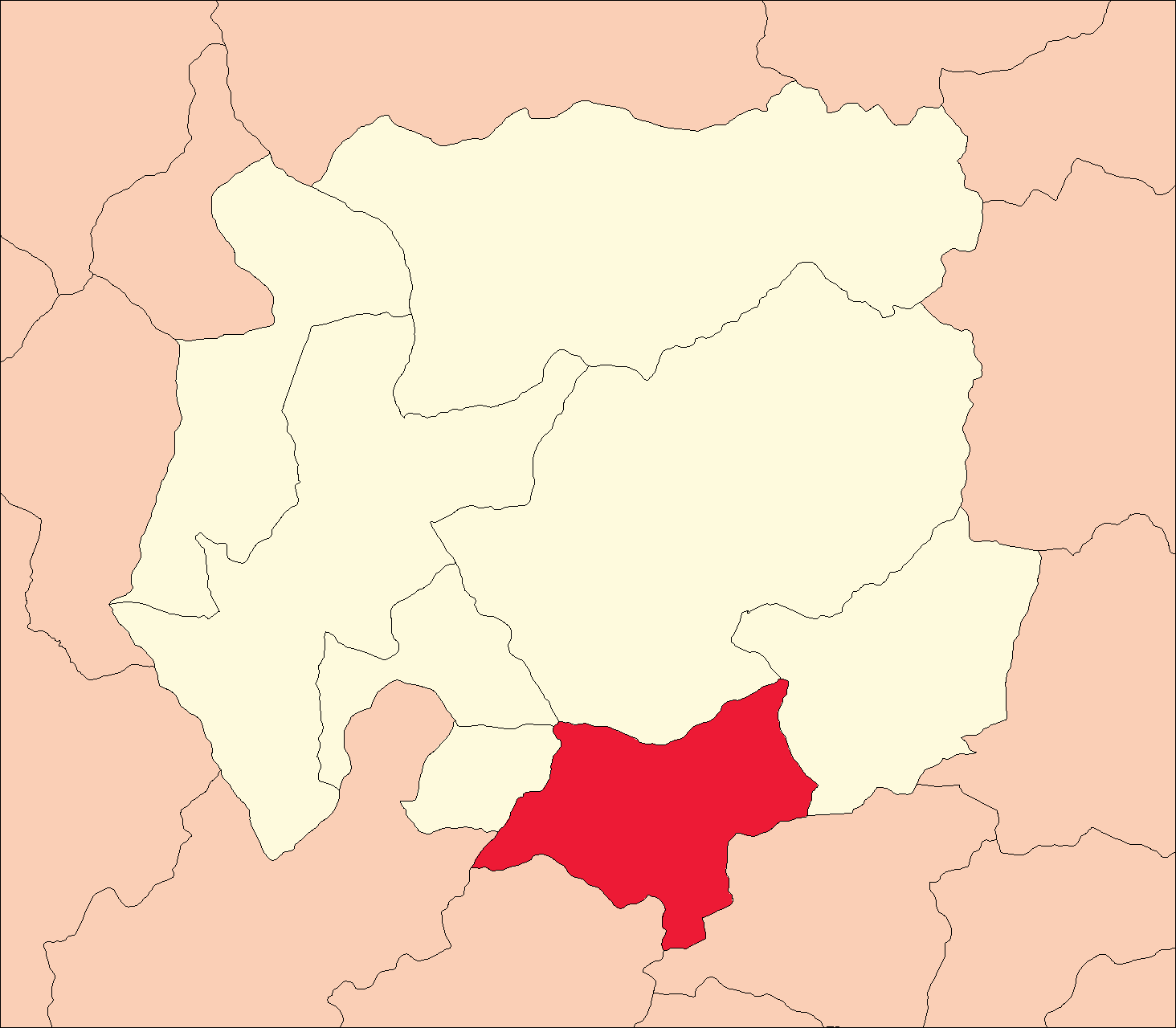 Ubicación del distrito de Choras.